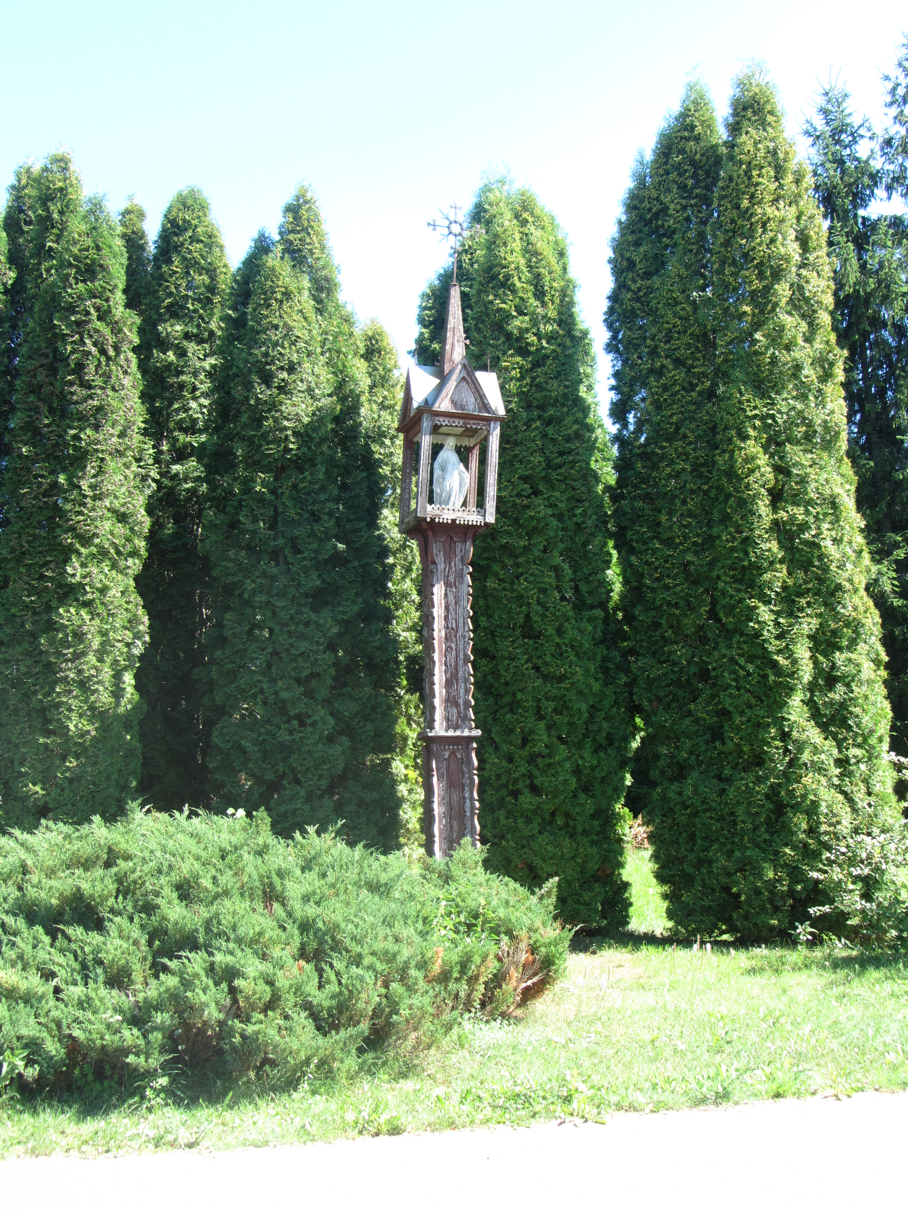 Aukštupėnai, Lithuania